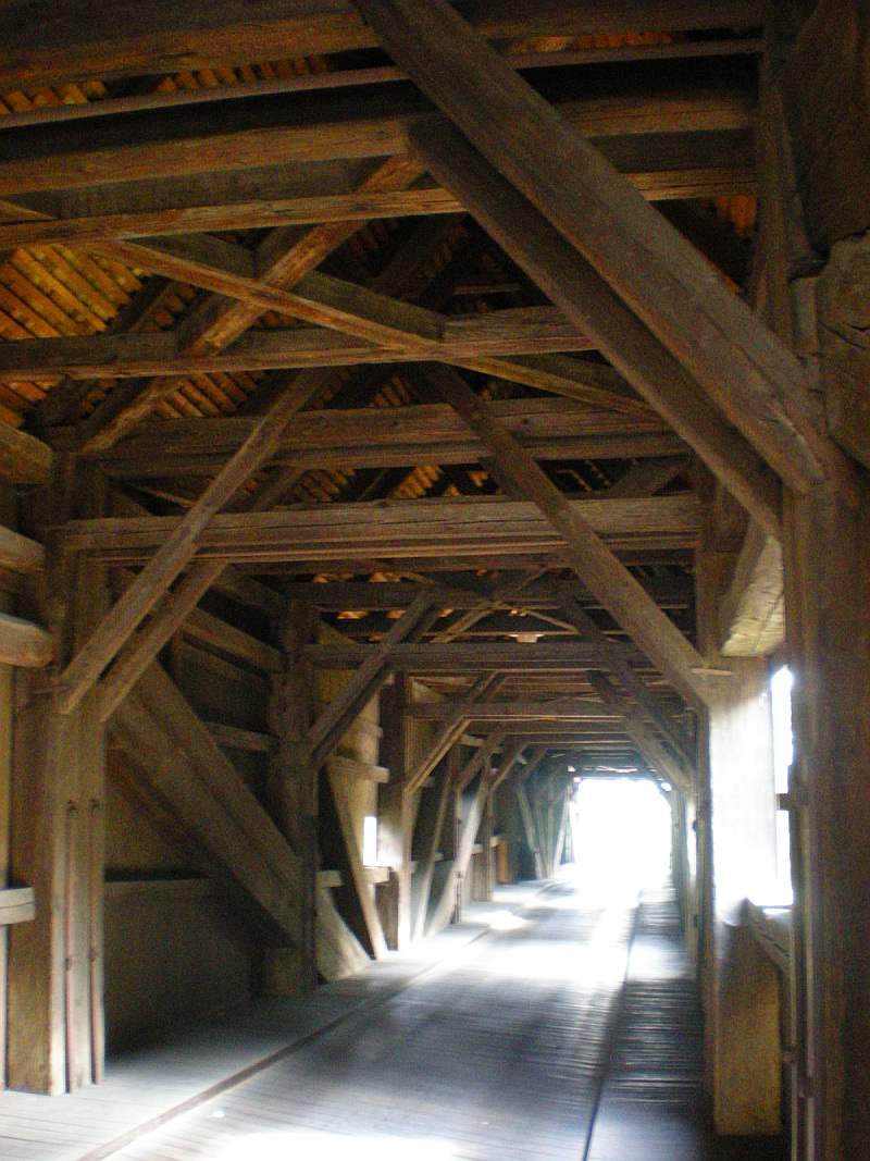 Tragwerk der Wünschendorfer Holzbrücke